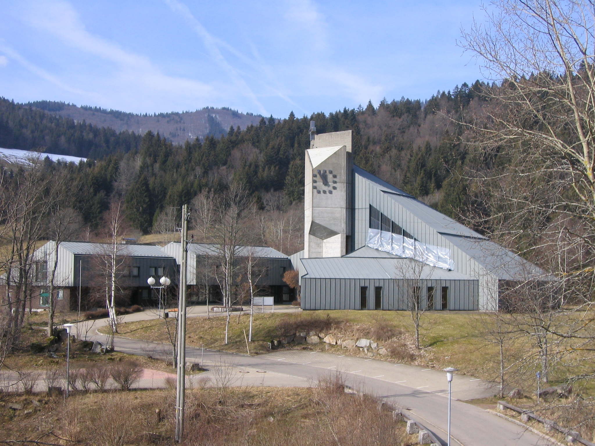 Katholische Kirche Menzenschwand